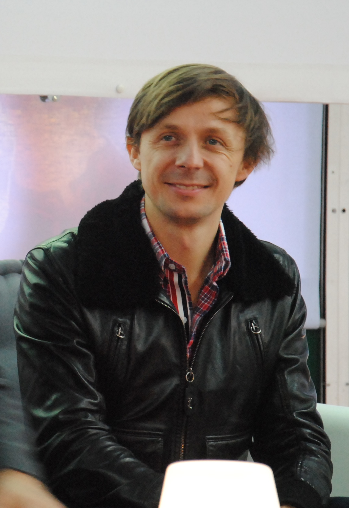 Le DJ français Martin Solveig, le 22 décembre 2012 au Parc du Futuroscope, lors de l'inauguration de l'attraction Danse avec les Robots.